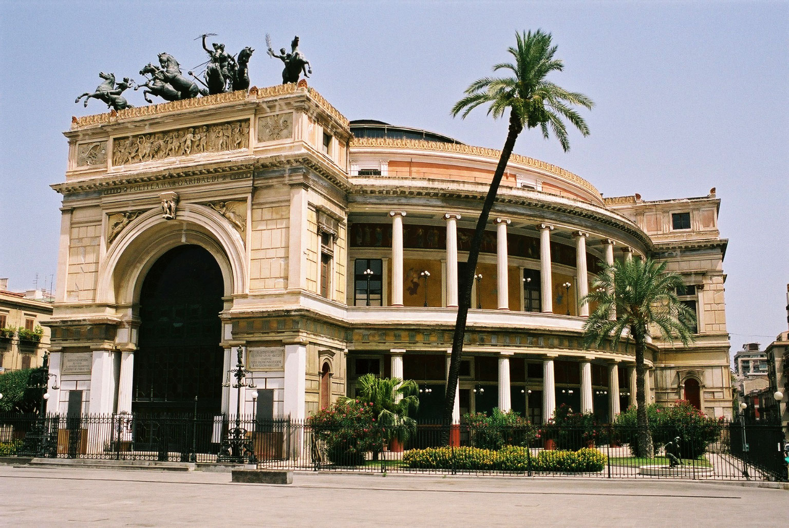 Teatro Politeama, Palermo. La quadriga è opera di Mario Rutelli e del suo maestro Benedetto Civiletti. Exterior view from Piazza Castelnuovo